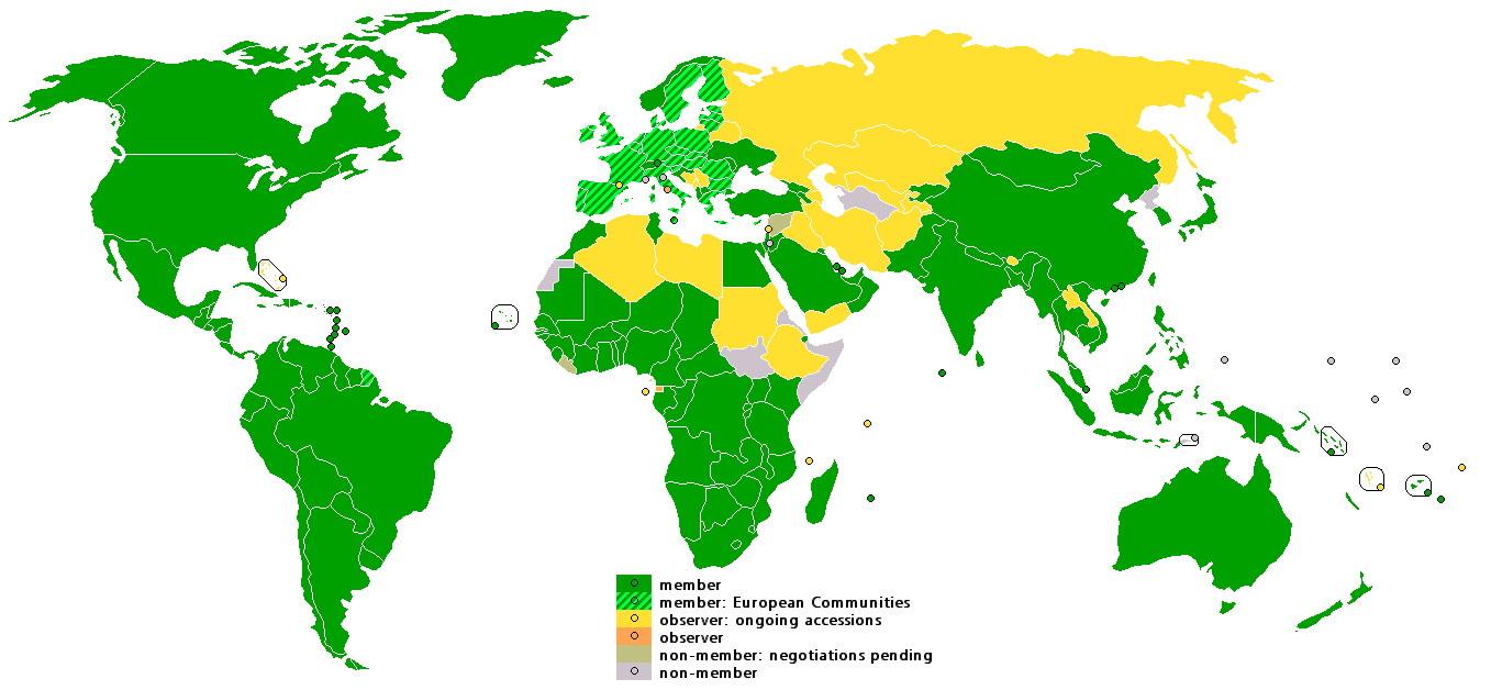 Participación en la Organización Mundial de Comercio (OMC) (2007) Miembros Miembros representados a través de la Unión Europea Observadores, pendientes de adhesión Observadores No miembros, pendientes de adhesión No miembros